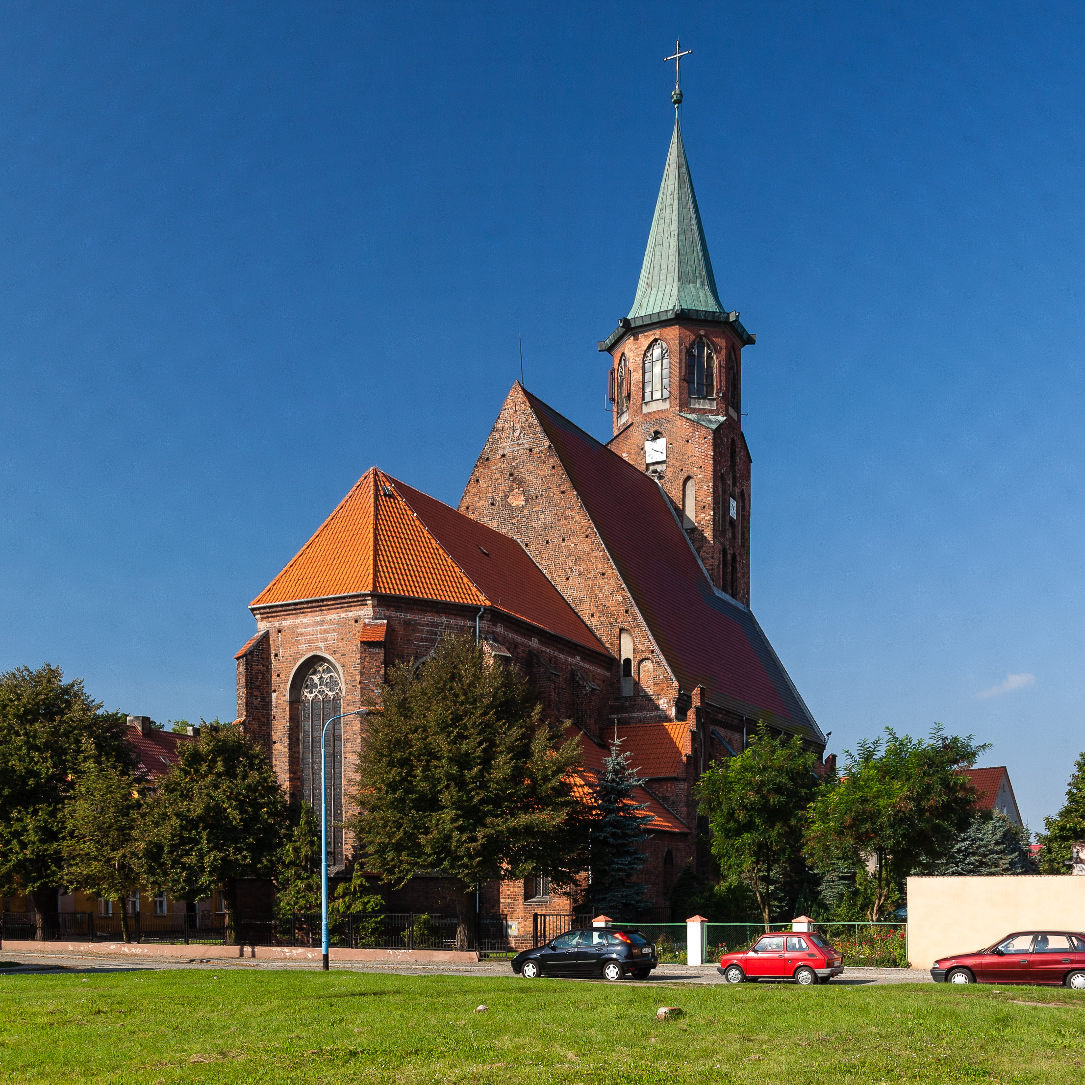 Ścinawa, pl. Kościelny - kościół par. pw. Podwyższenia Krzyża